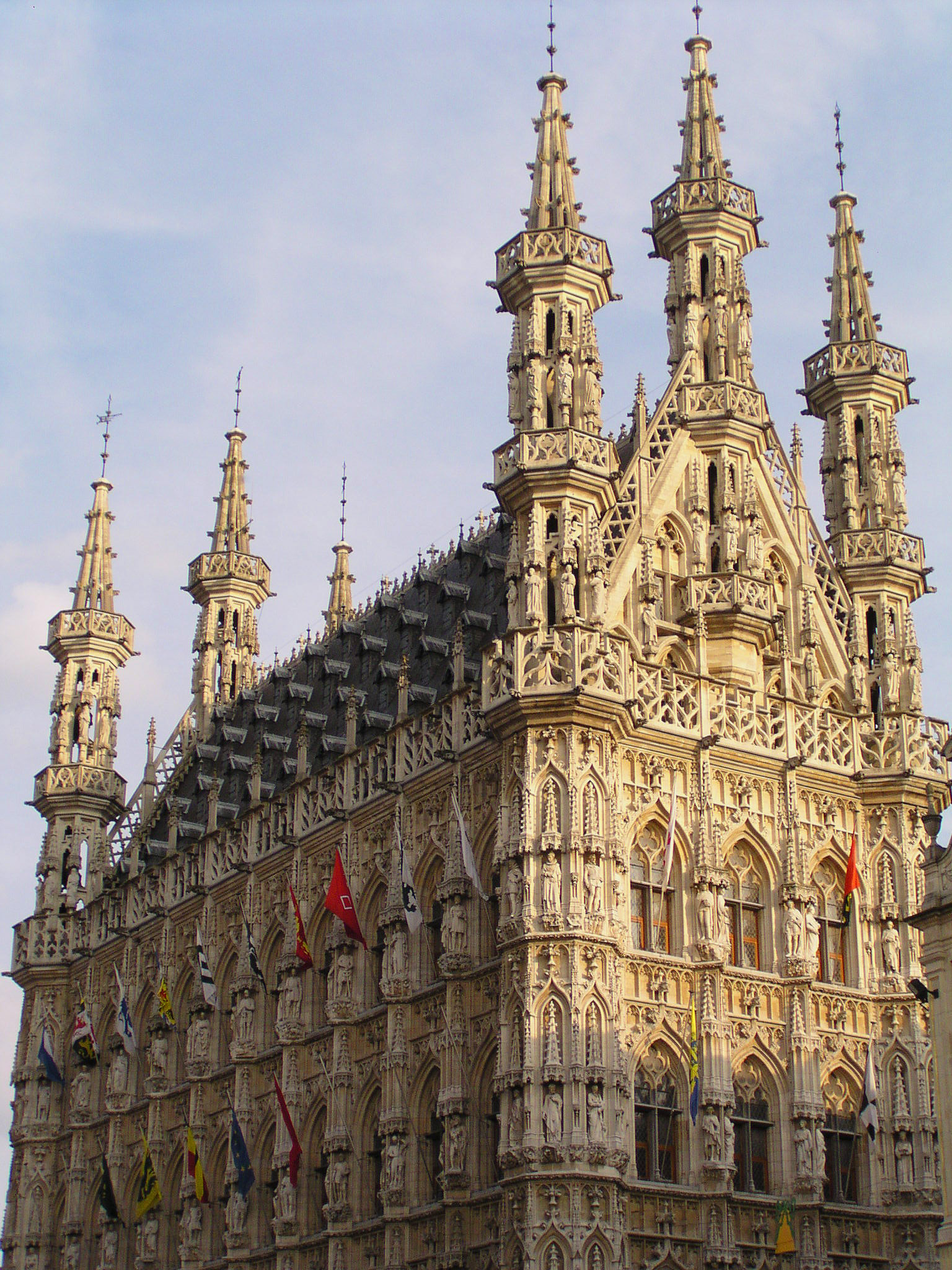 Several years ago I lived in the neighbourhood (100 metres) of this beautiful town hall . I'm still fascinated when I pass this gothic jewel, like today. Vandaag nog 's in mijn achternaam geweest, en dan blijf ik altijd hangen bij het stadhuis. Ik zat vroeger tussen de Oude Markt en de Grote Markt "op kot", honderd meter van dit gotisch juwelenkistje.